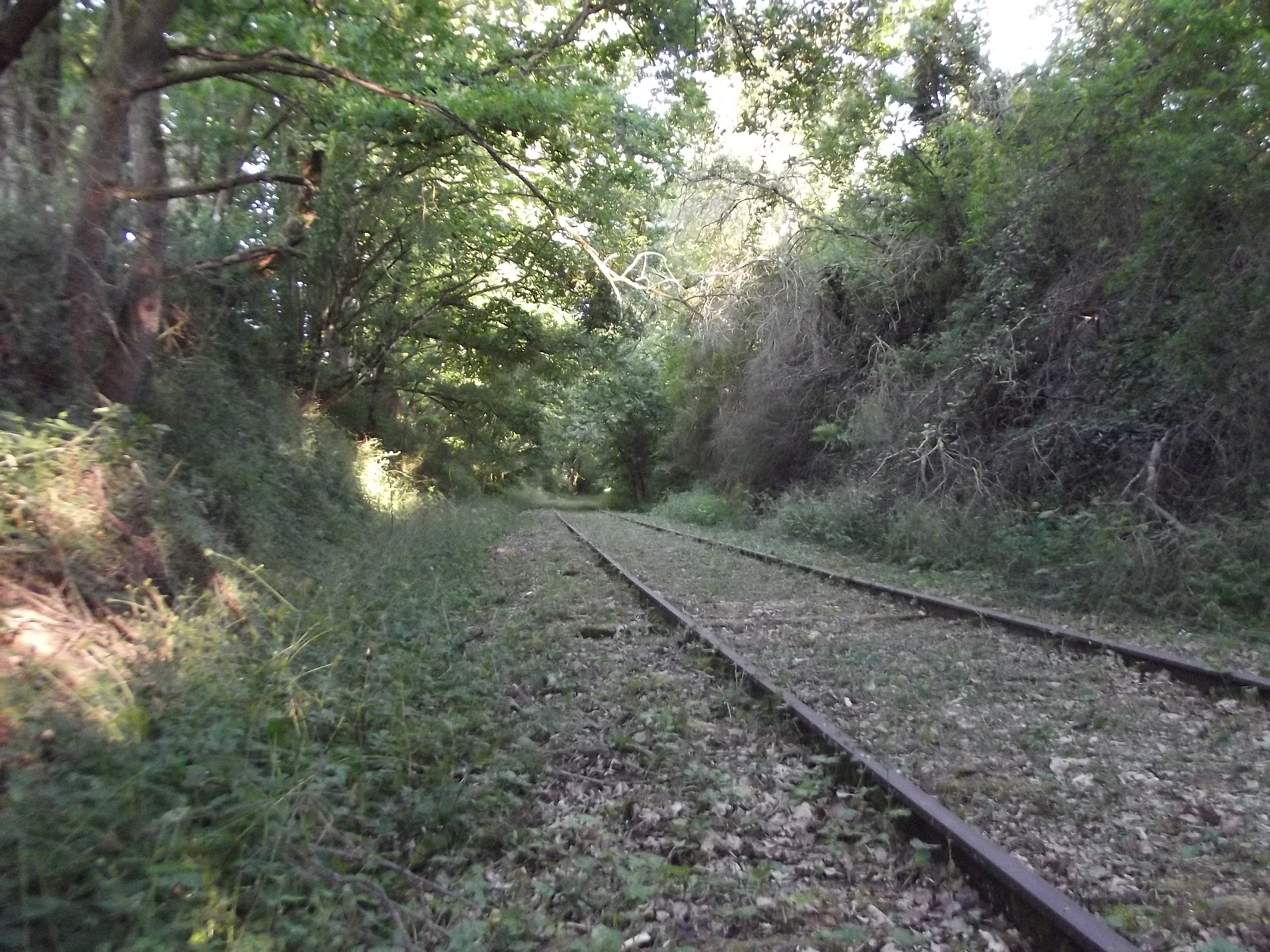 Commune de Haudonville - Département de Meurthe et Moselle - Photographie personnelle, prise le 1 juin 2020 - Copyright © Audric Touvron